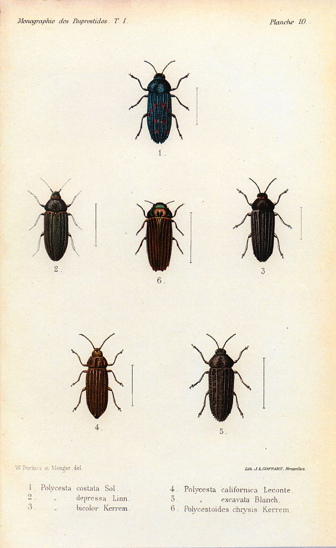 Polycesta costata Sol. = Polycesta costata (Solier, 1849) Polycesta depressa Linn. = Polycesta depressa (Linnaeus, 1771) Polycesta bicolor Kerrem. = Polycesta bicolor Kerremans, 1897 Polycesta californica Leconte. = Polycesta californica LeConte, 1857 Polycesta excavata Blanch. = Polycesta excavata Blanchard, 1846 Polycestoides chrysis Kerrem. = Polycestoides chrysis (Kerremans, 1902)